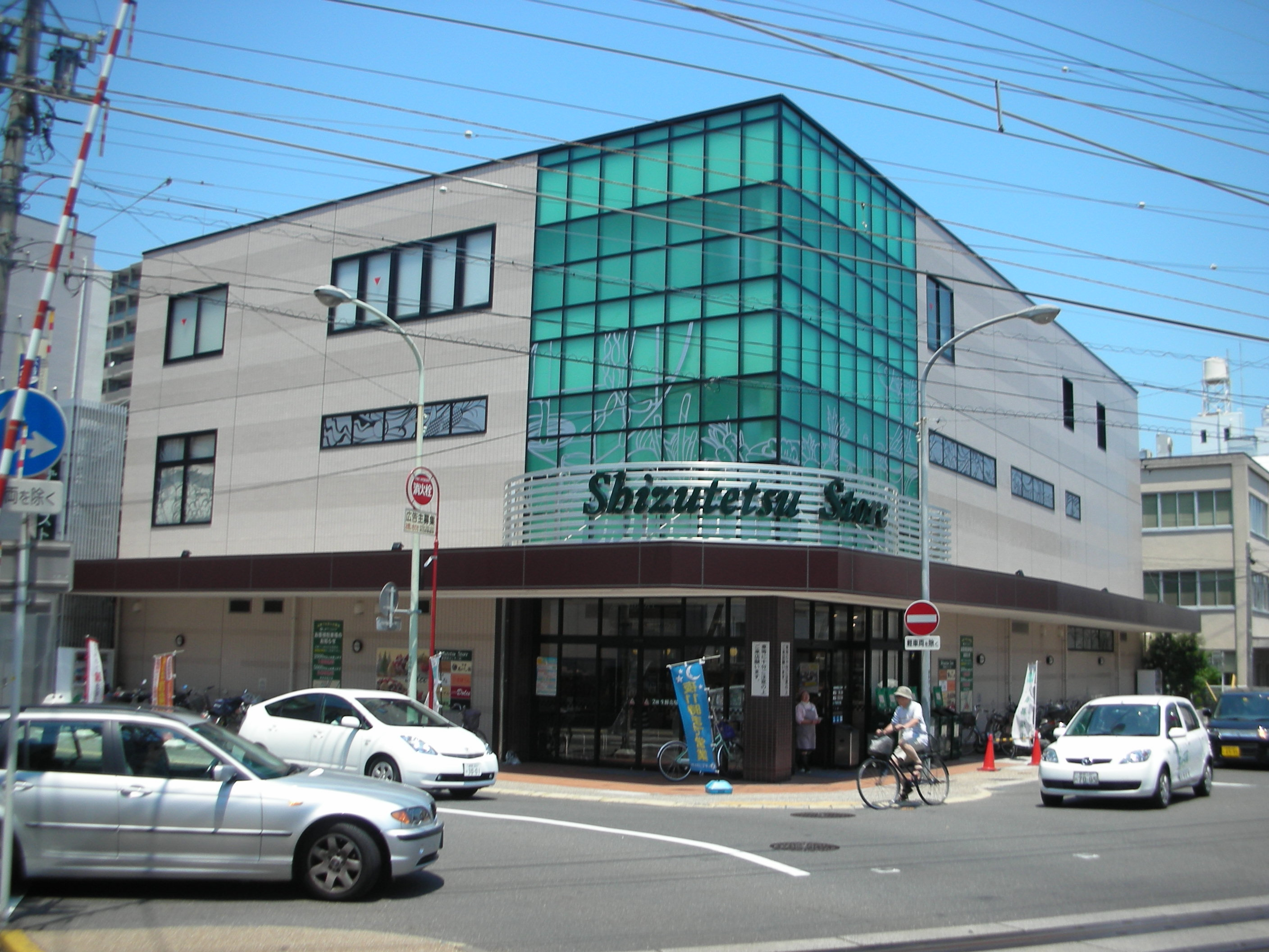 しずてつストア新静岡センター店の外観